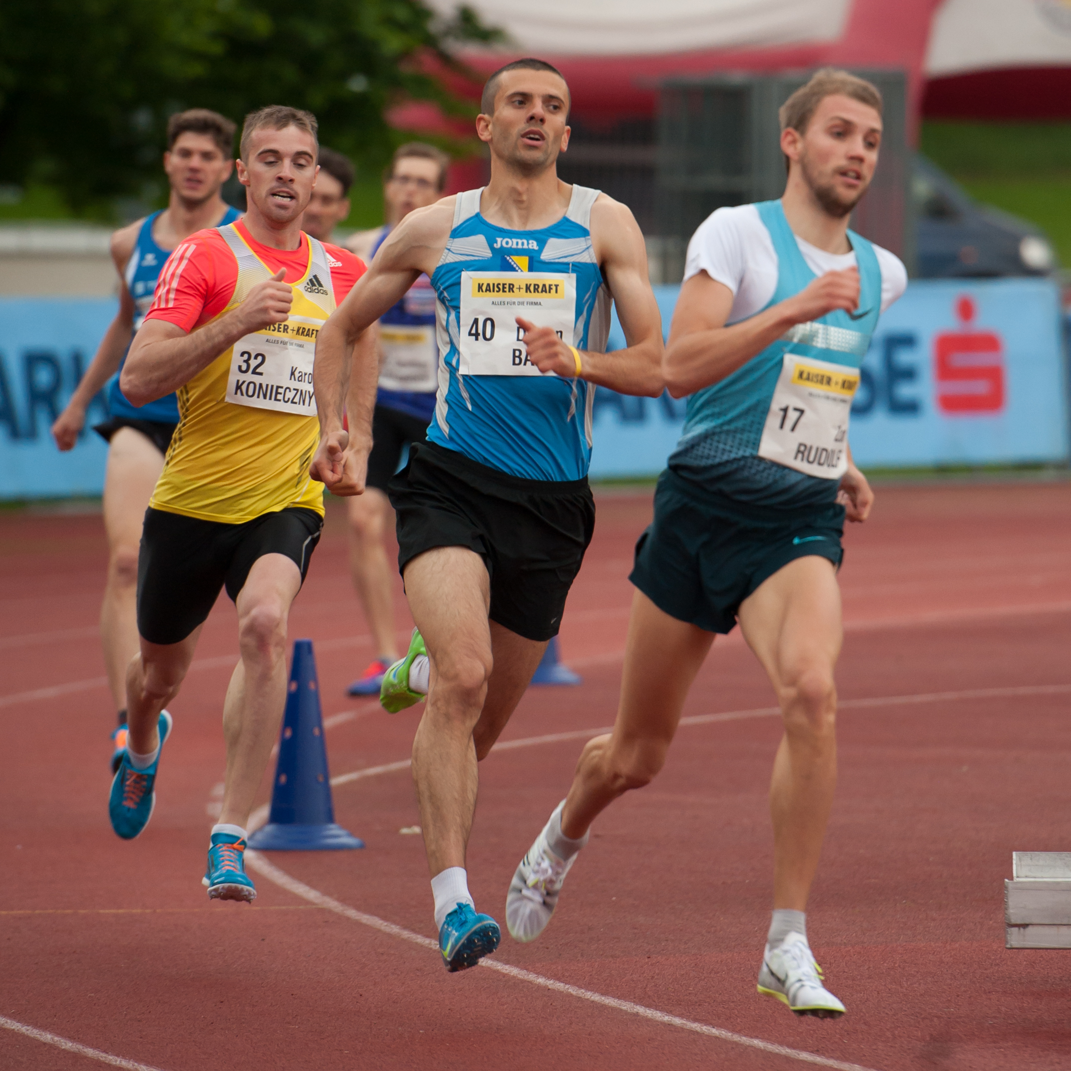 Salzburger Leichtathletik Gala am 27. Mai 2015: Dusan Babic